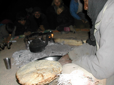 Tagela 2 Algérie